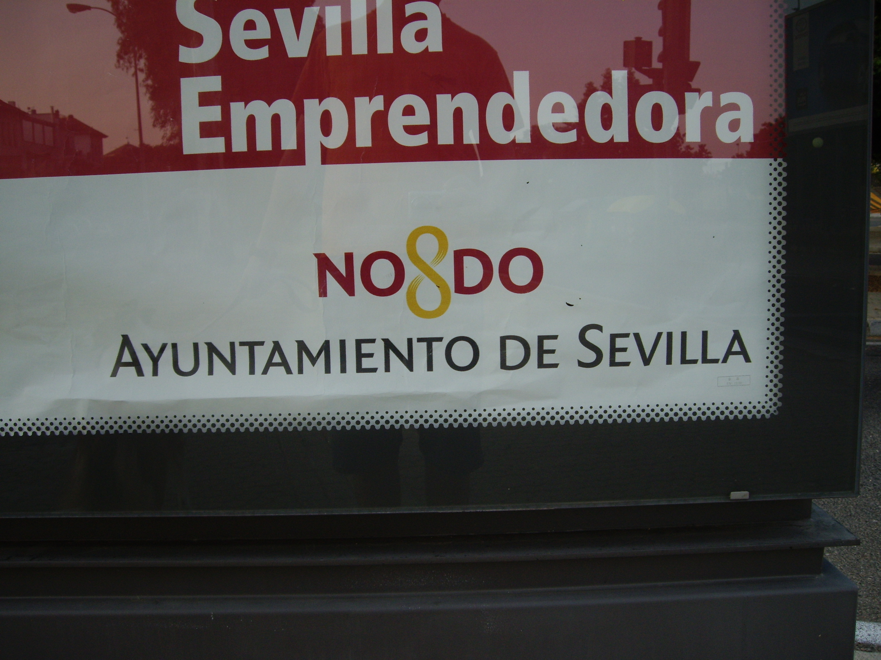 Logotipo del Ayuntamiento de Sevilla en una valla publicitaria de una calle de la ciudad